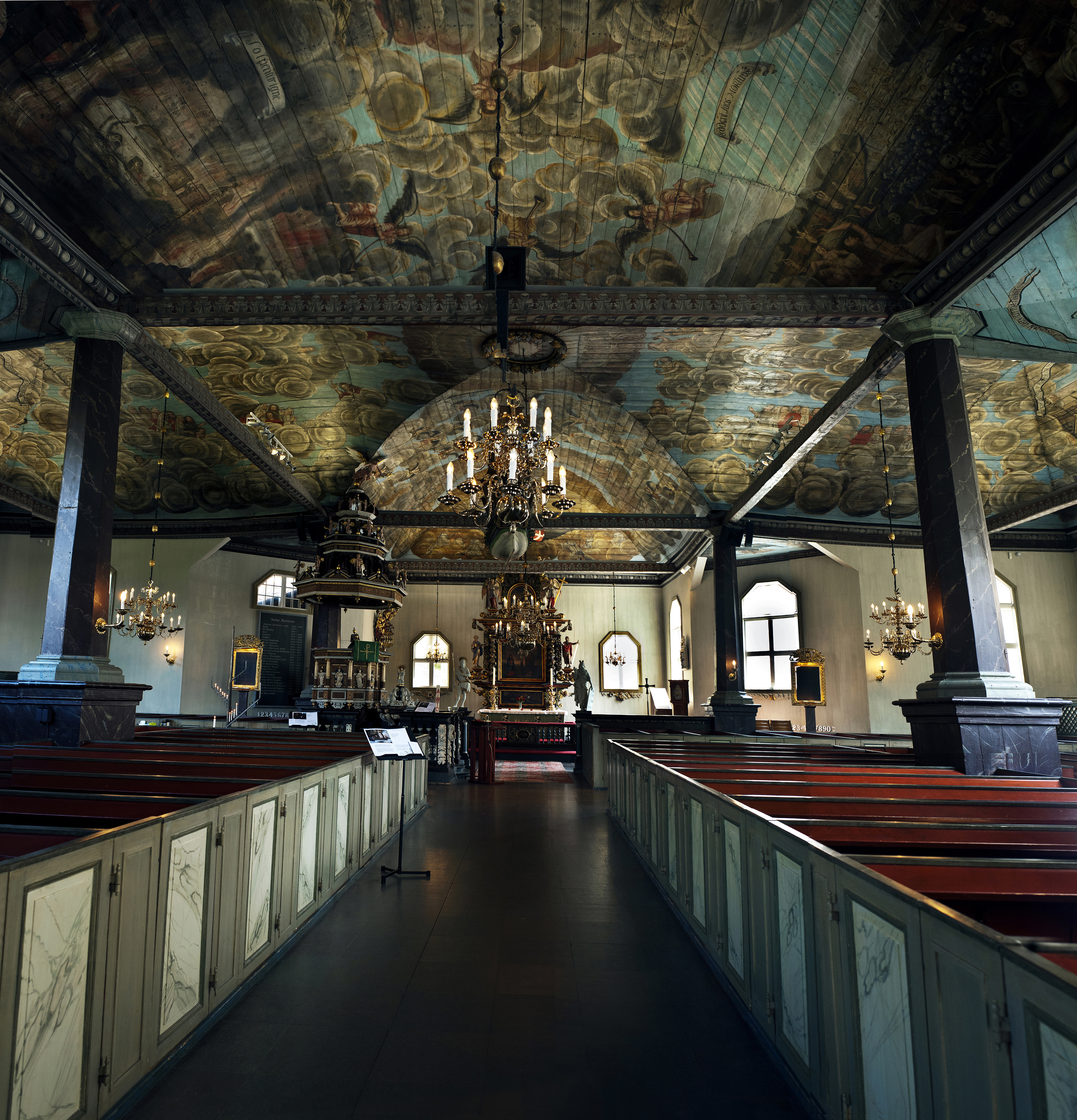 Kungälvs kyrka, interiör. // Kungälv Church in Sweden, interior. // Plafondmålningarna är utförda 1697-1698 av Erik Eriksson Grijs (1650-1729].